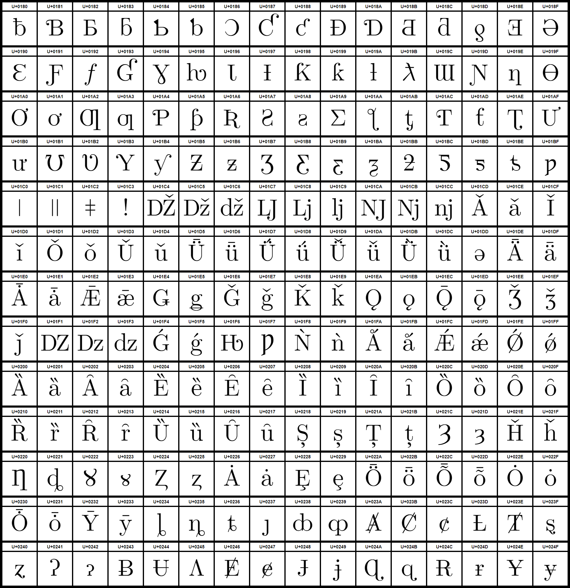 Grafiktafel für den Unicodeblock Lateinisch, erweitert-B.